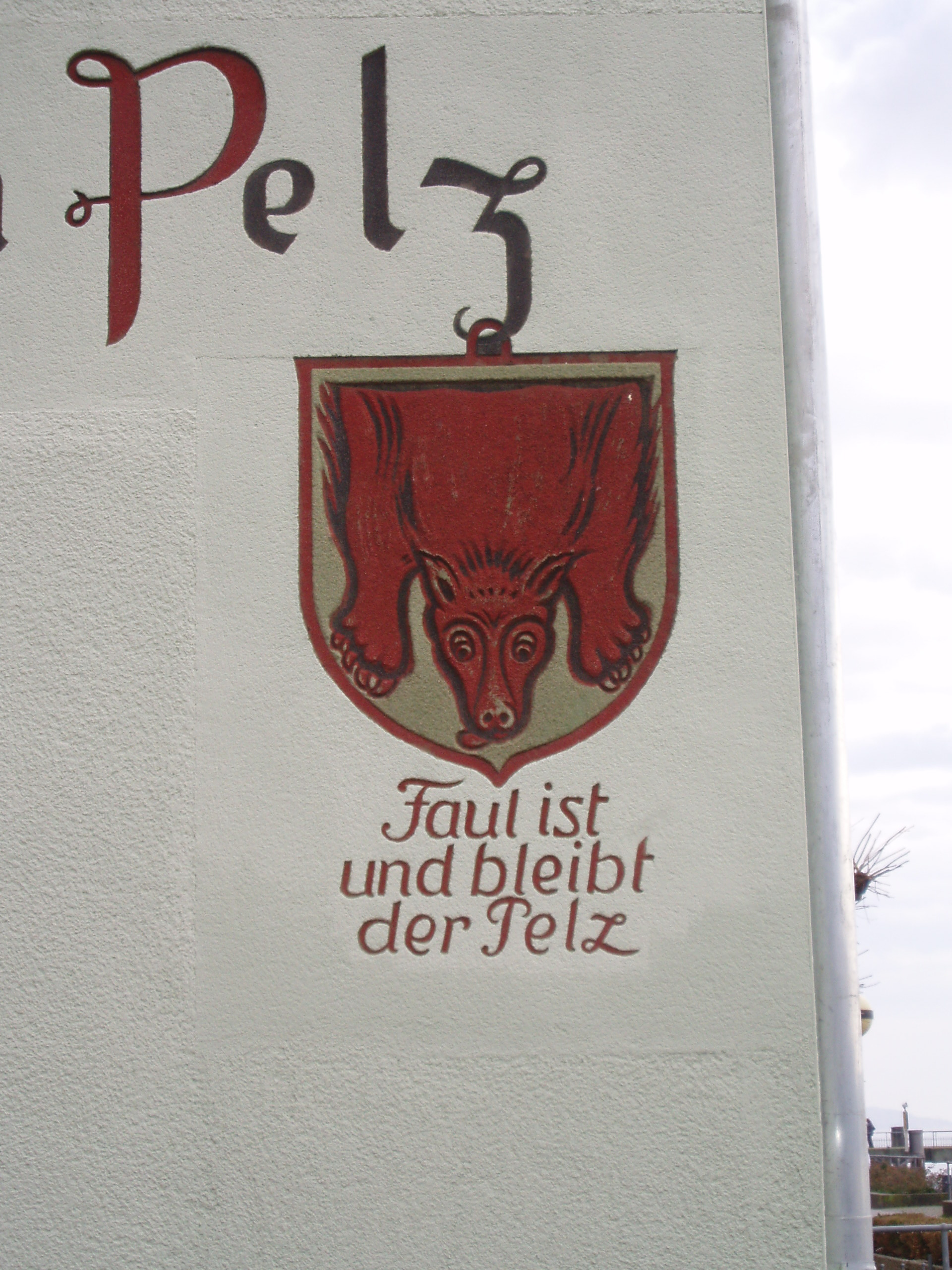 Wirtshaus zum Faulen Pelz, Überlingen, Detail